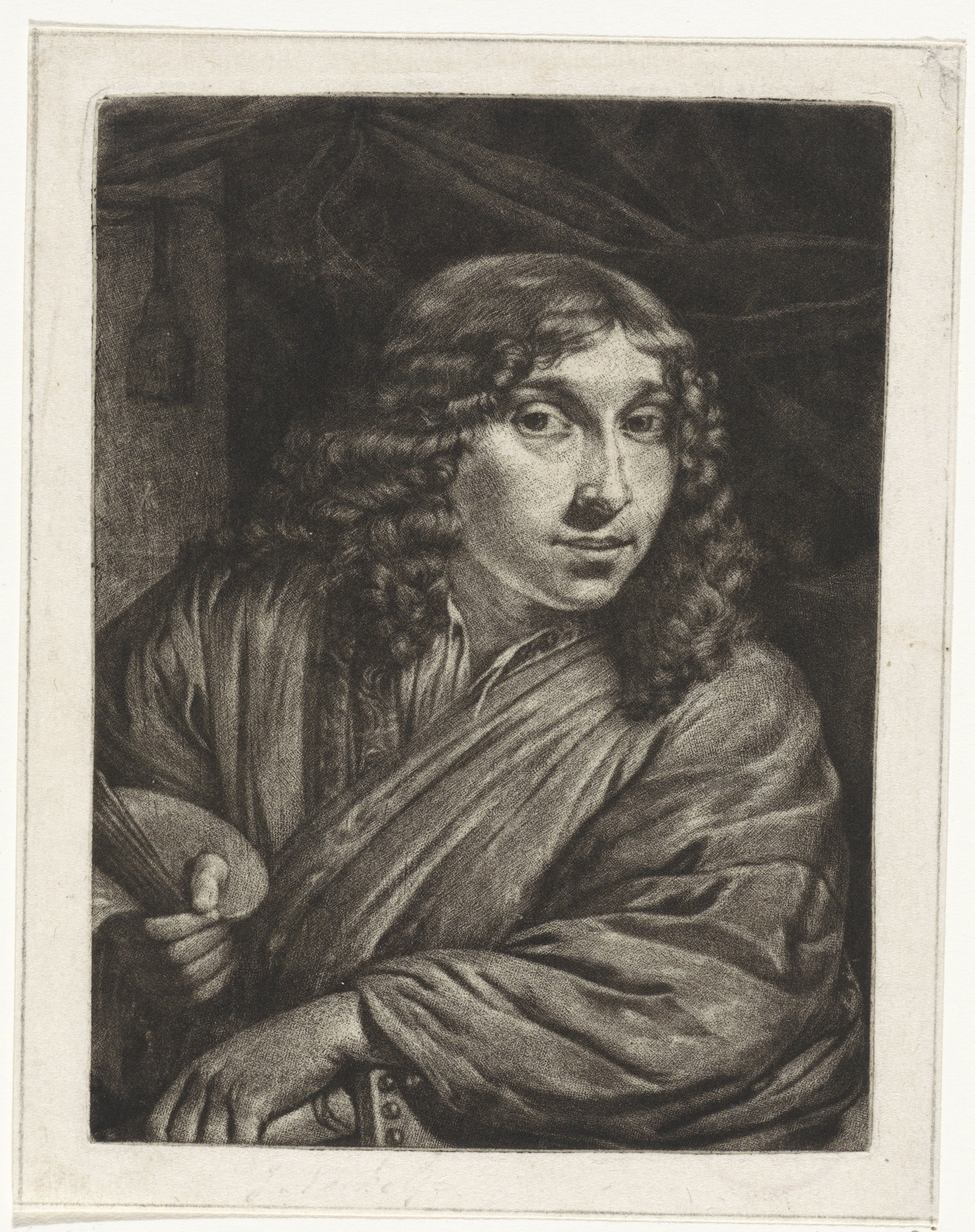 Self-portrait